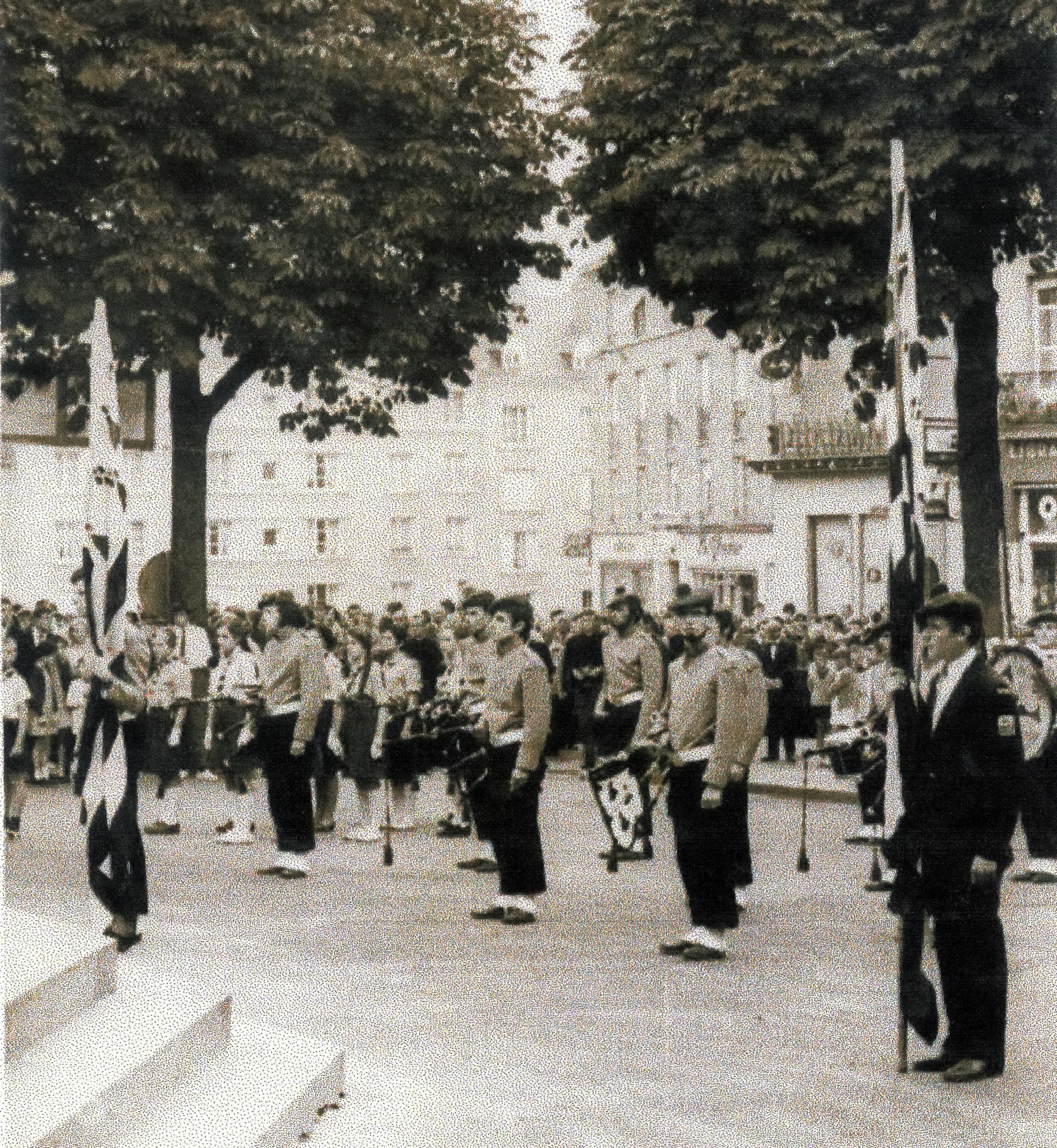 Prestation des scouts du Bagad Bleimor lors d'une cérémonie publique à Fougères (Ille-et-Vilaine) en 1966.